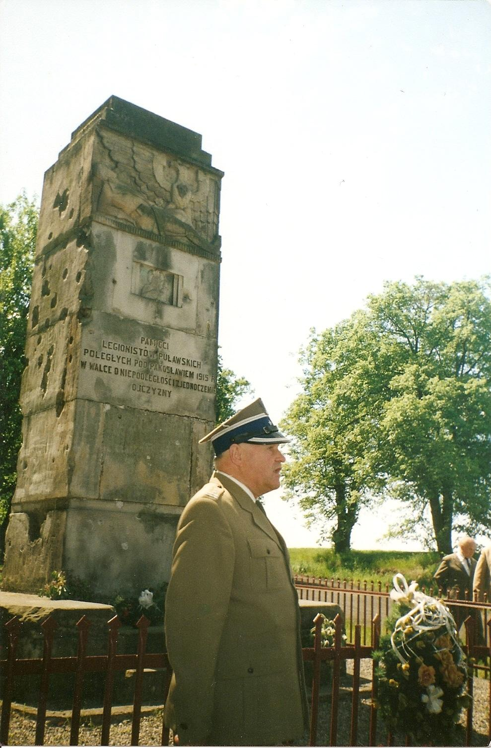 Ppłk. Lucjan Bródka przy pomniku Poległych Żołnierzy Legionu Puławskiego w Pakosławiu (zabytek nr A/408)